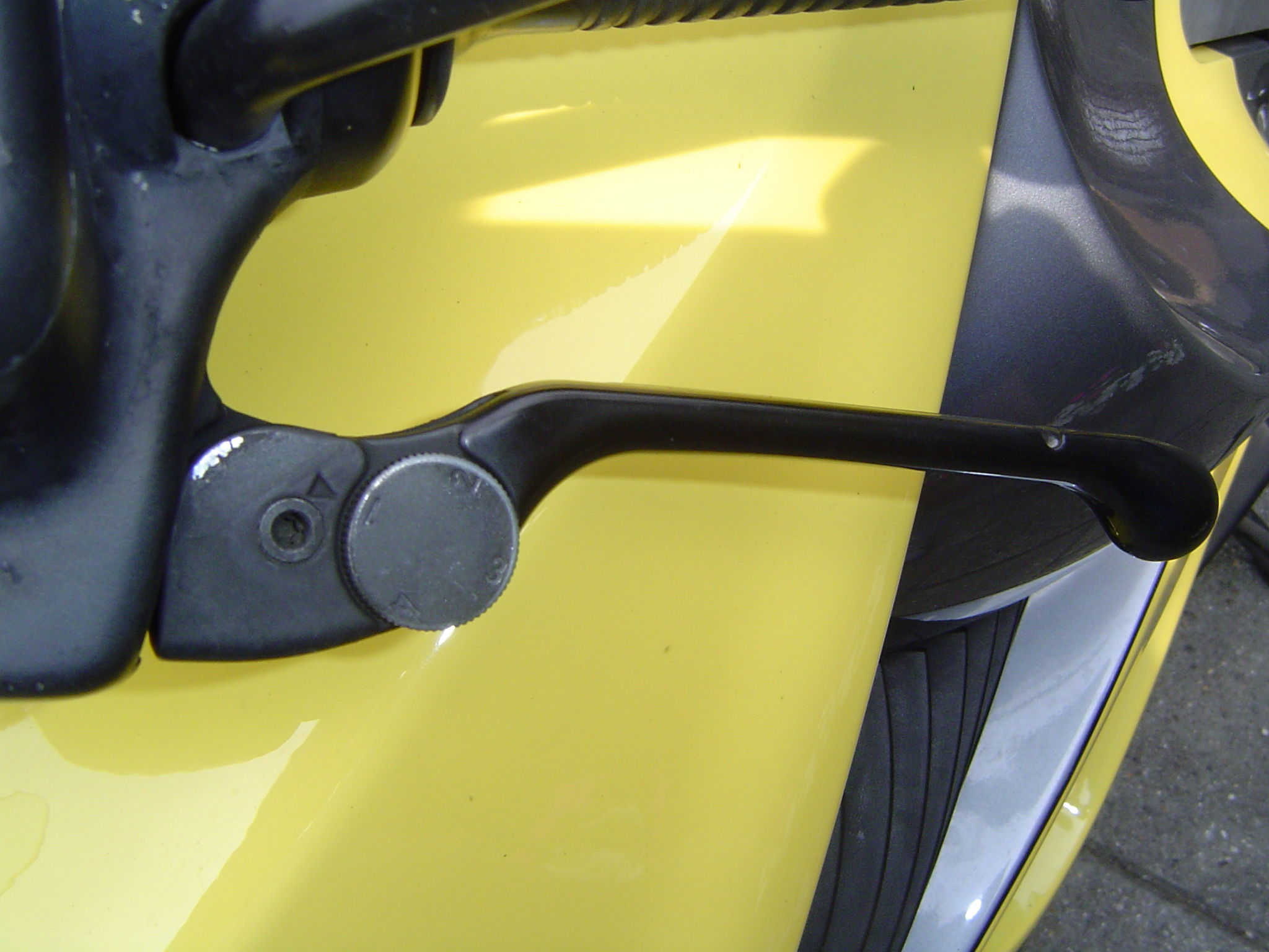 Hondepoot hendel. Verstelbare koppelings- en remhendels.